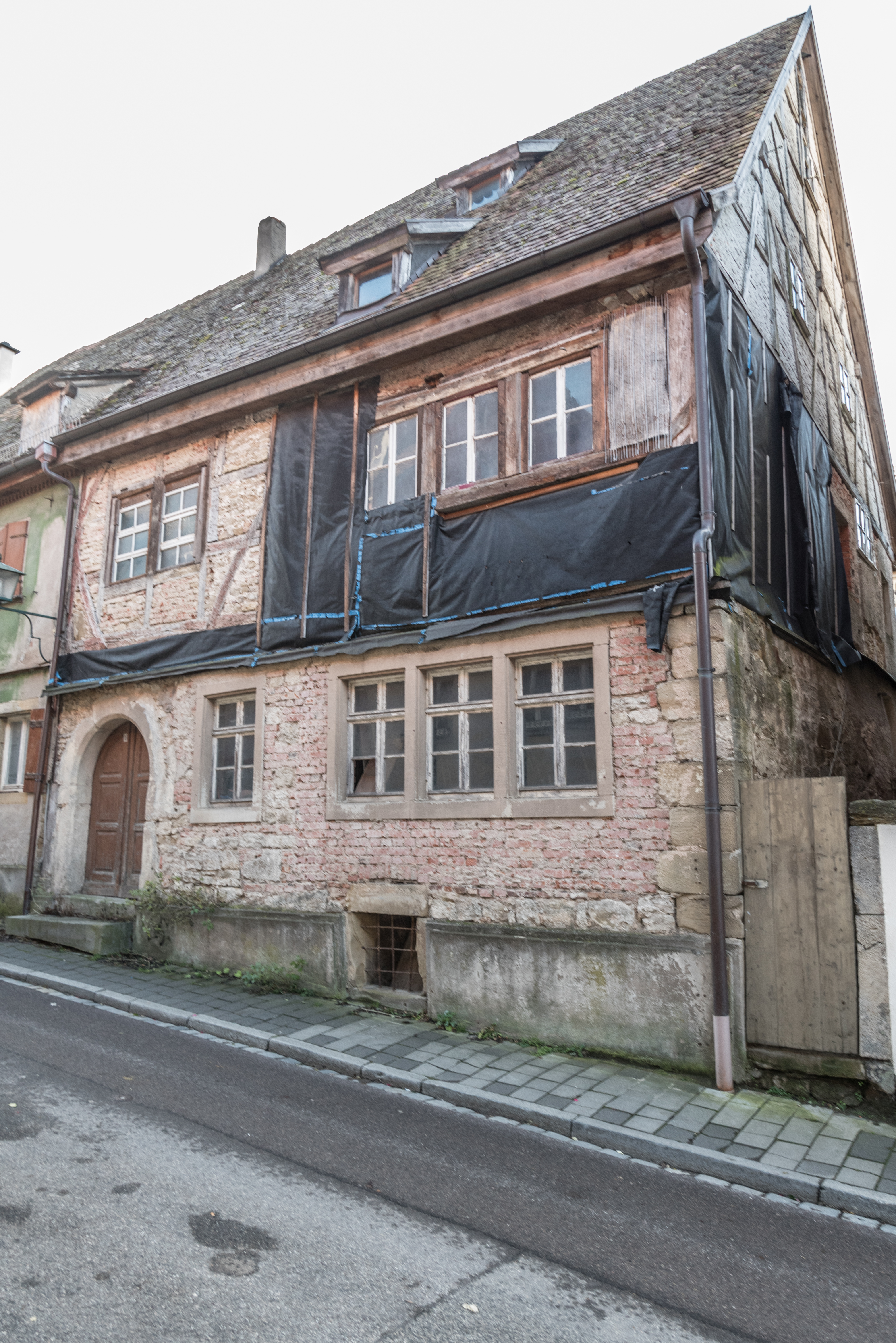 Rothenburg ob der Tauber, Judengasse 10